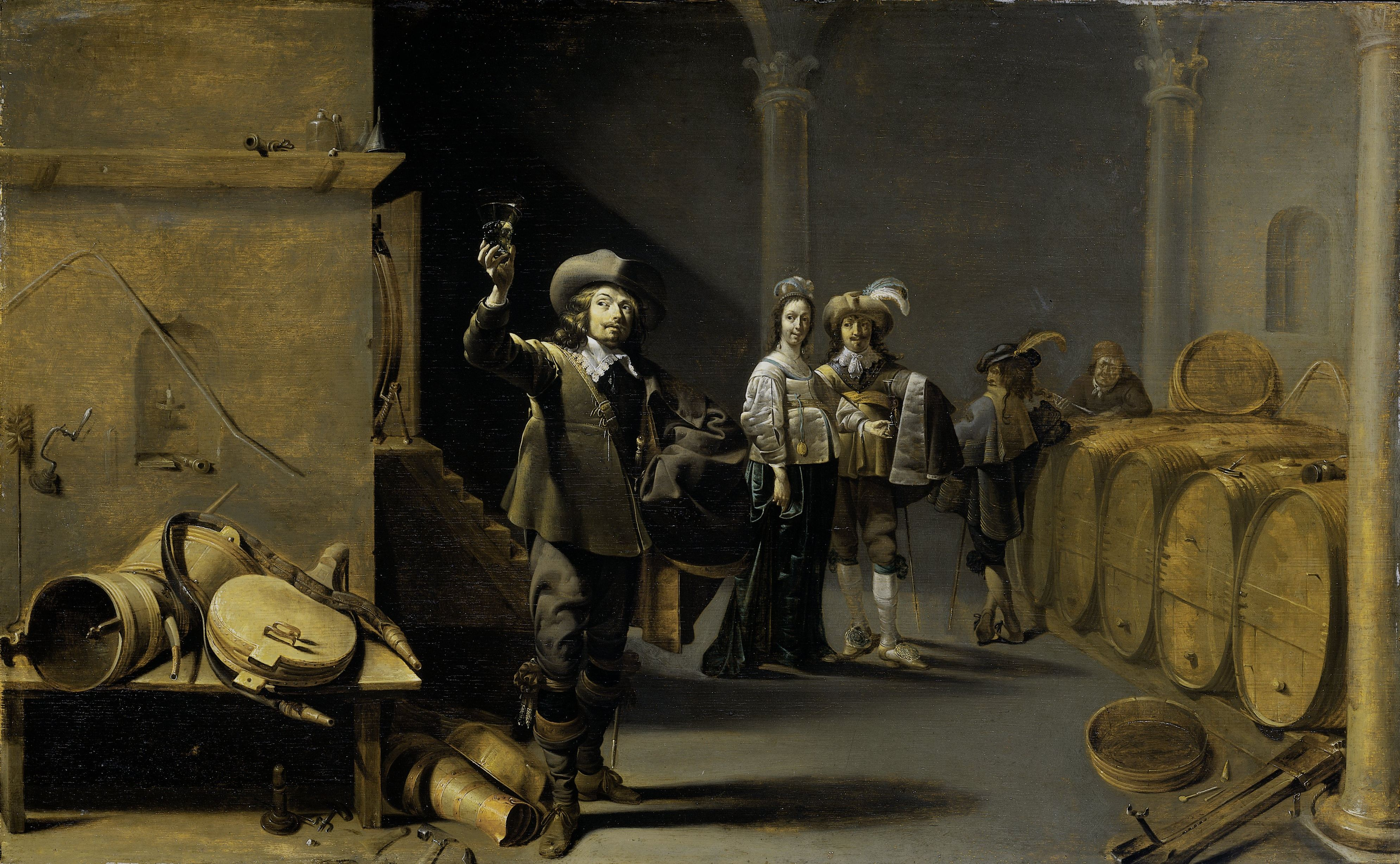 De wijnproevers. In een wijnkelder houdt een man een glas met wijn tegen het licht. Rechts een rij wijnvaten, op de achtergrond kijken een man en een vrouw toe. Links op een houten bank liggen allerlei soorten gereedschap: emmers, slangen, blaasbalg etc.